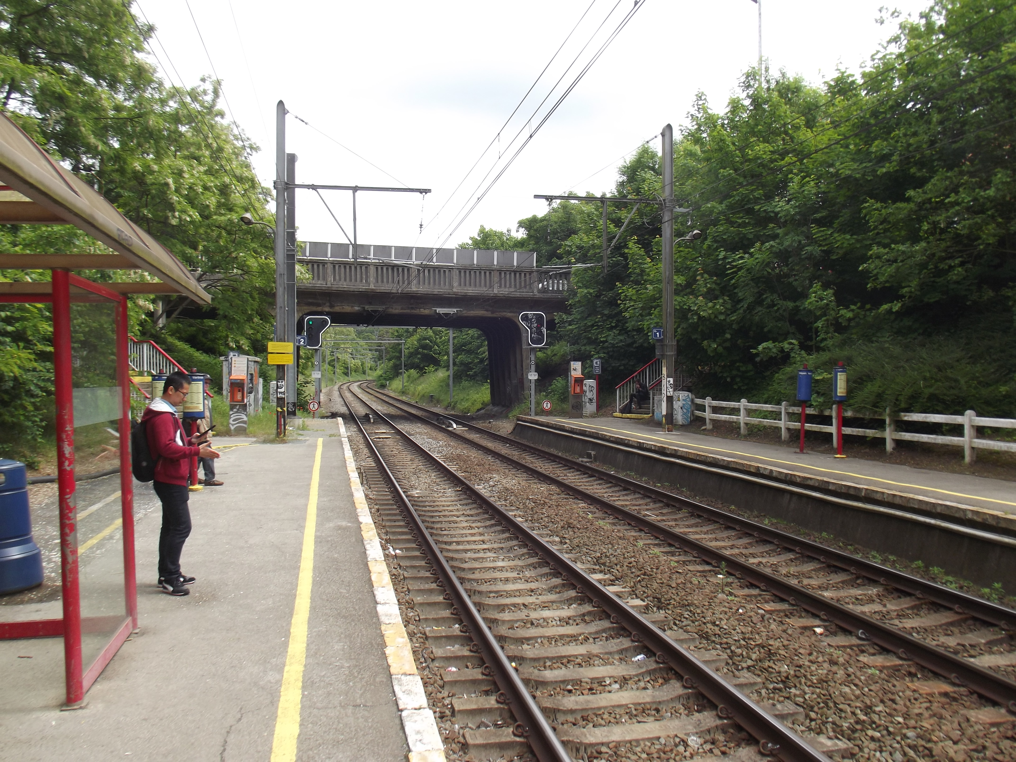 Station van Sint-Job op lijn 26